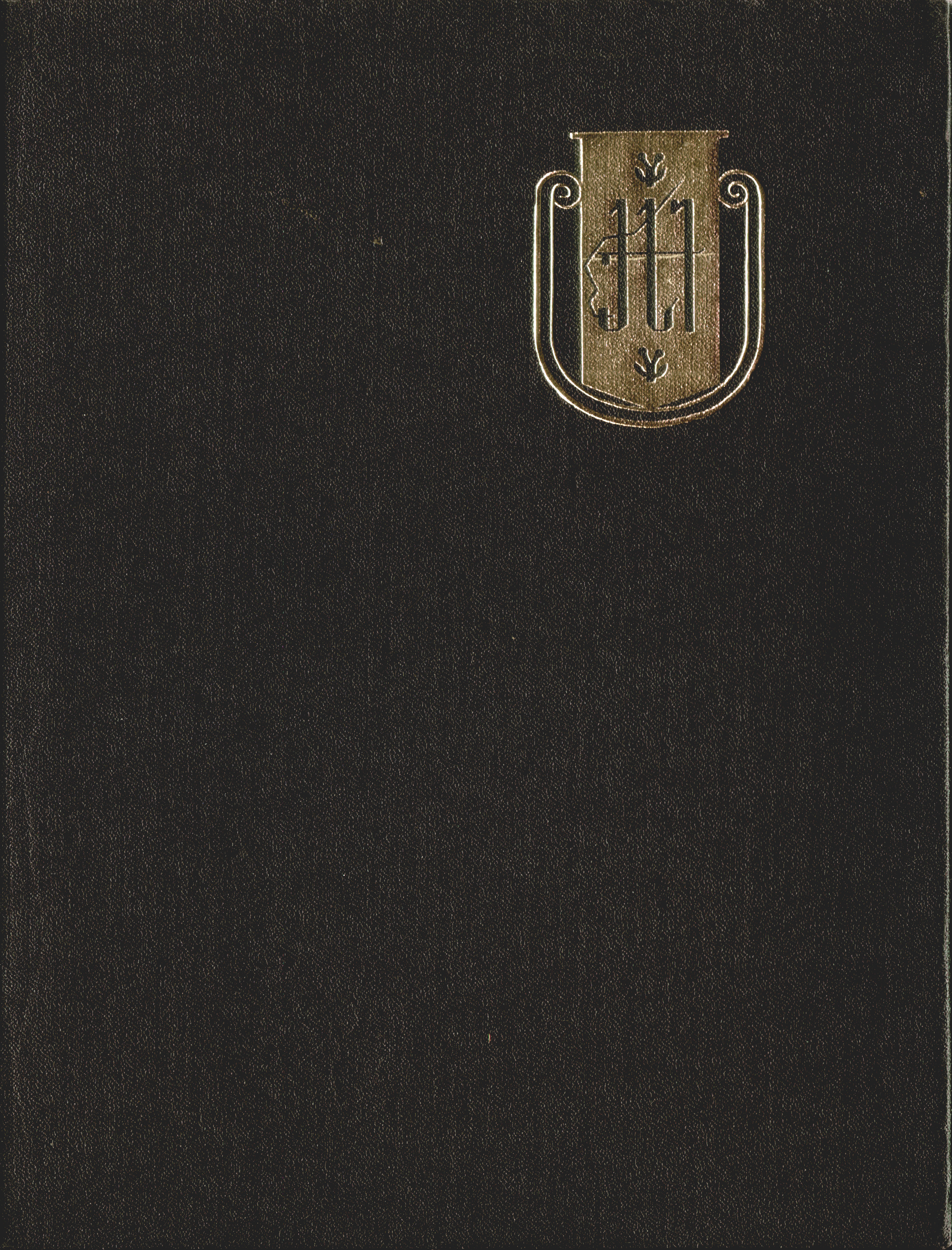 ქართული საბჭოთა ენციკლოპედიის ყდა (შუბლი), ტომი "საქ სსრ", 1981 თბილისი